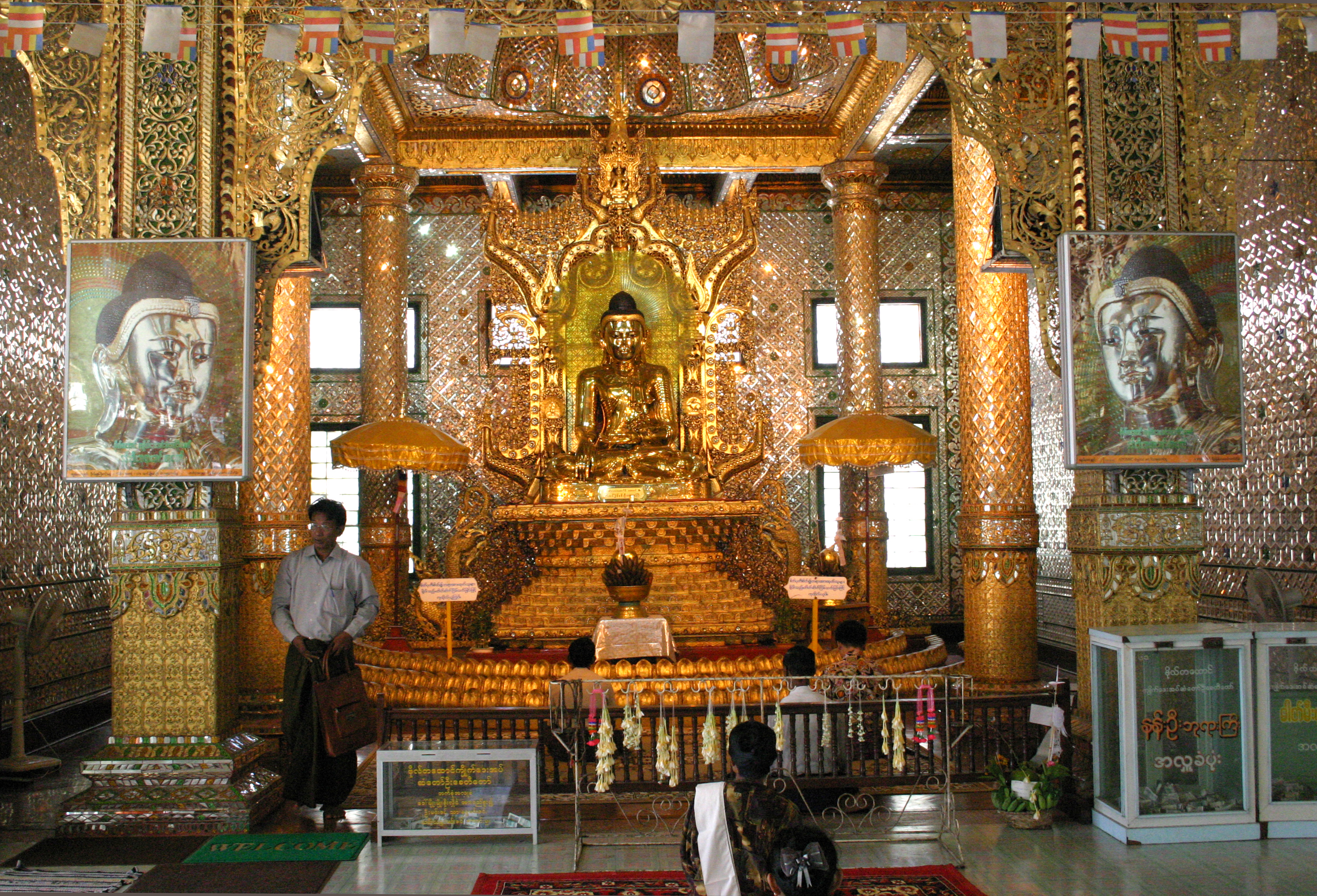 Botataung-Pagode in Yangon in Myanmar.